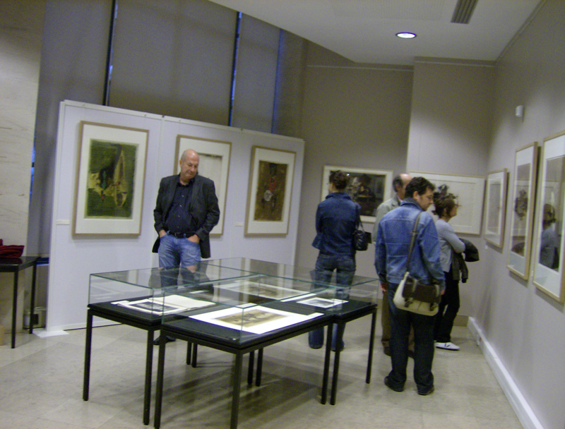 Exposition des estampes de Johnny Friedlaender (1912-1992) à l'Institut national d'histoire de l'art, Galerie Colbert, à Paris.